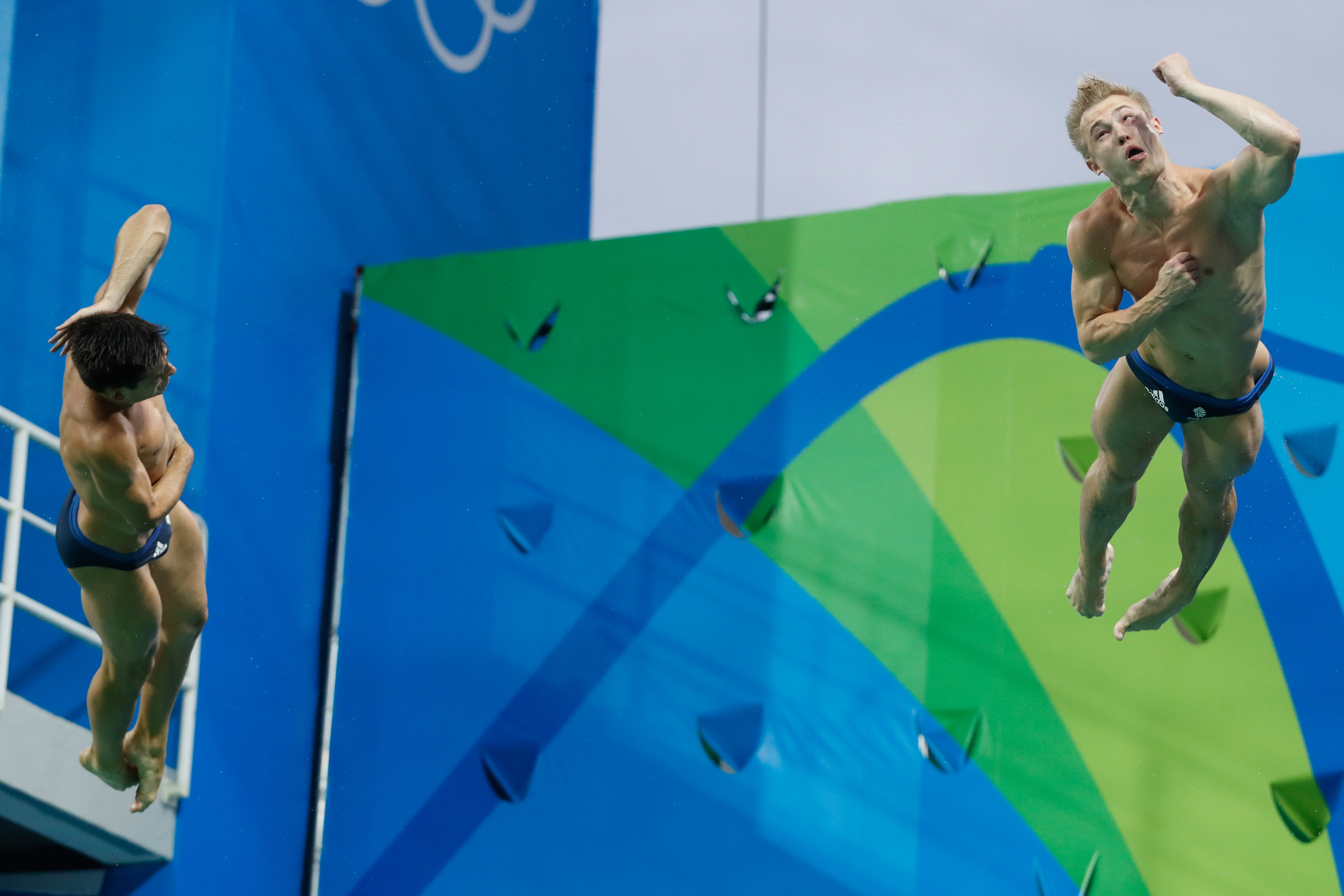 Rio de Janeiro - Britânicos Jack Laugher e Chris Mears é ouro no trampolim de 3 metros sincronizado dos saltos ornamentais nos Jogos Olímpicos Rio 2016, no Parque Aquático Maria Lenk (Fernando Frazão/Agência Brasil)